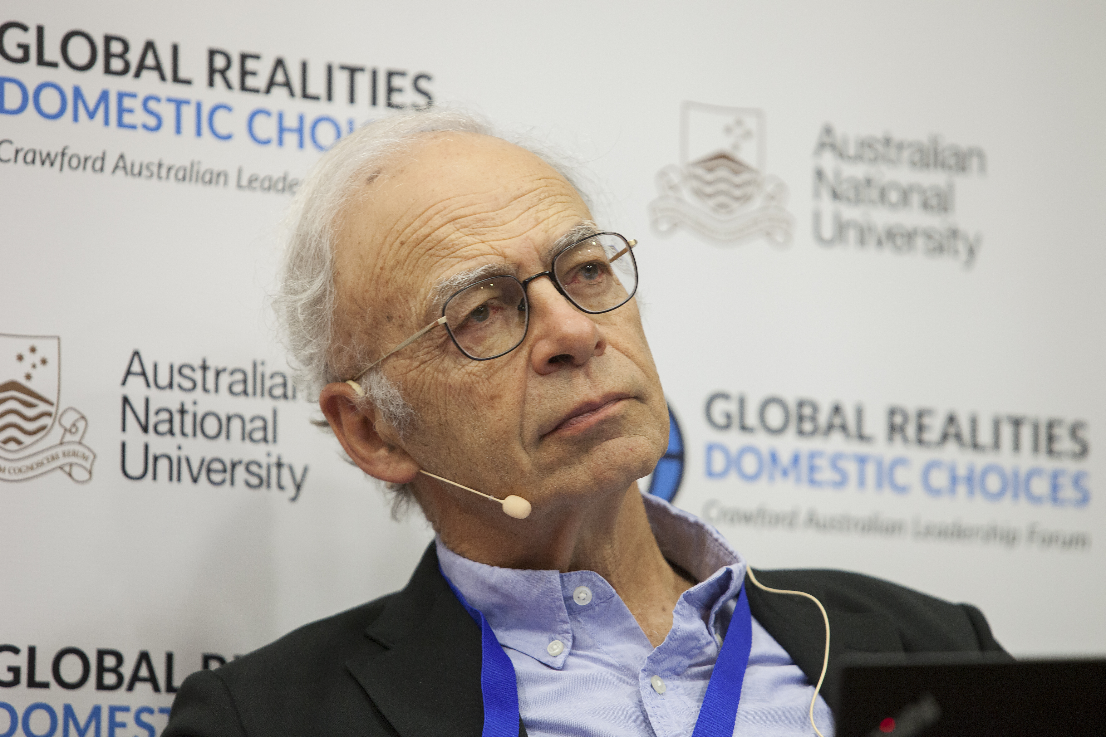 Peter Singer at Crawford Forum 2017